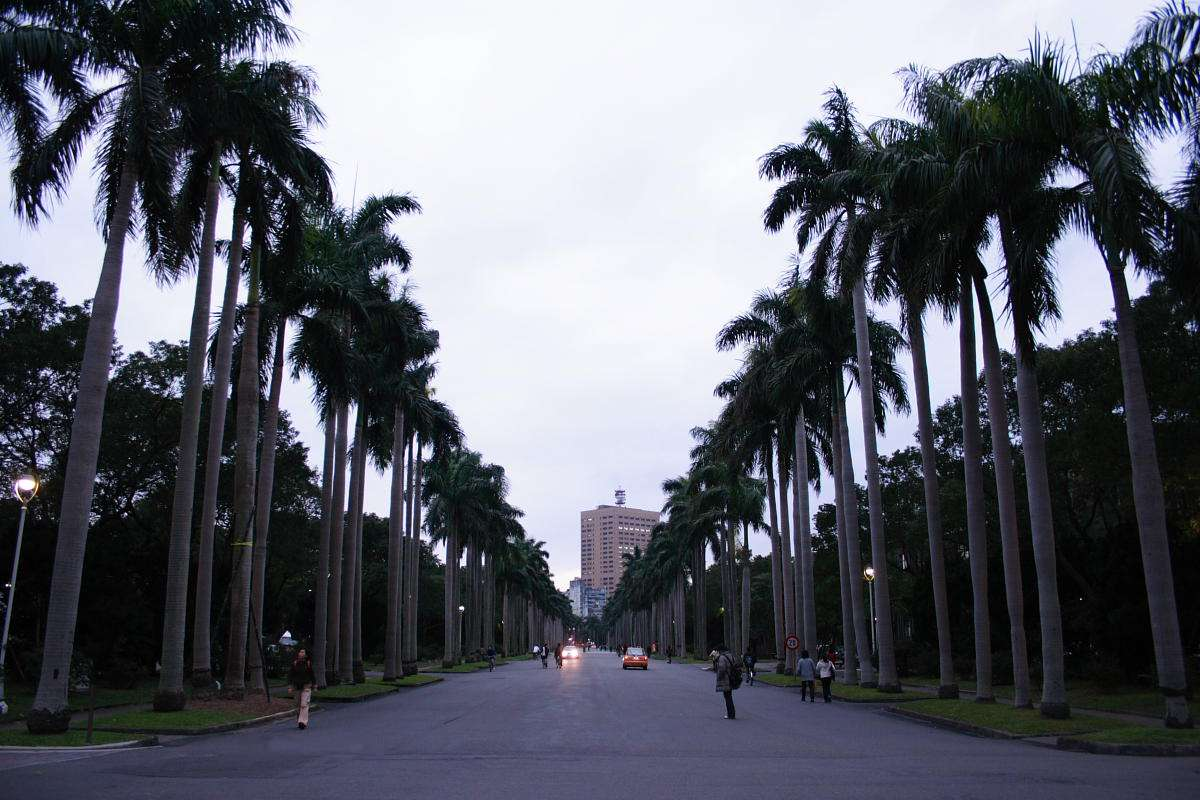 中文（台灣）: 台灣大學の椰林大道